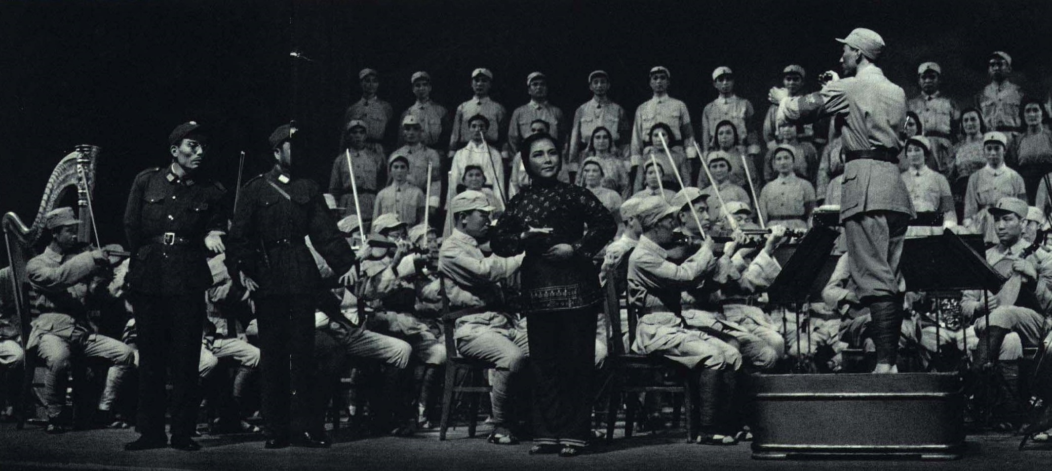 1967-08 1967年 沙家浜交响乐2Z